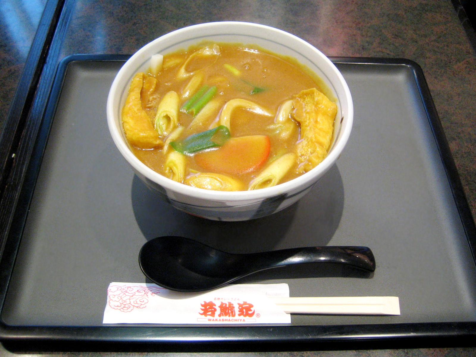 カレーうどん。若鯱家にて Curry udon (カレーうどん) , at Wakashachiya (若鯱家)